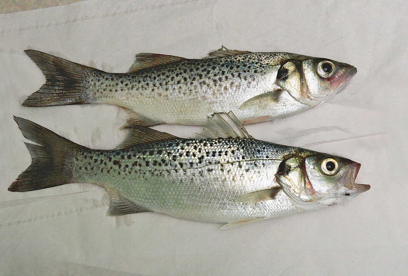 Dicentrarchus punctatus from Mauritania.